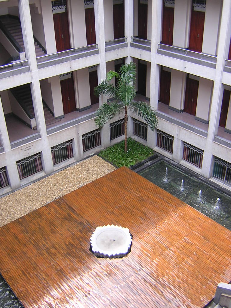 Museo de Antioquia, Medellín, Colombia.